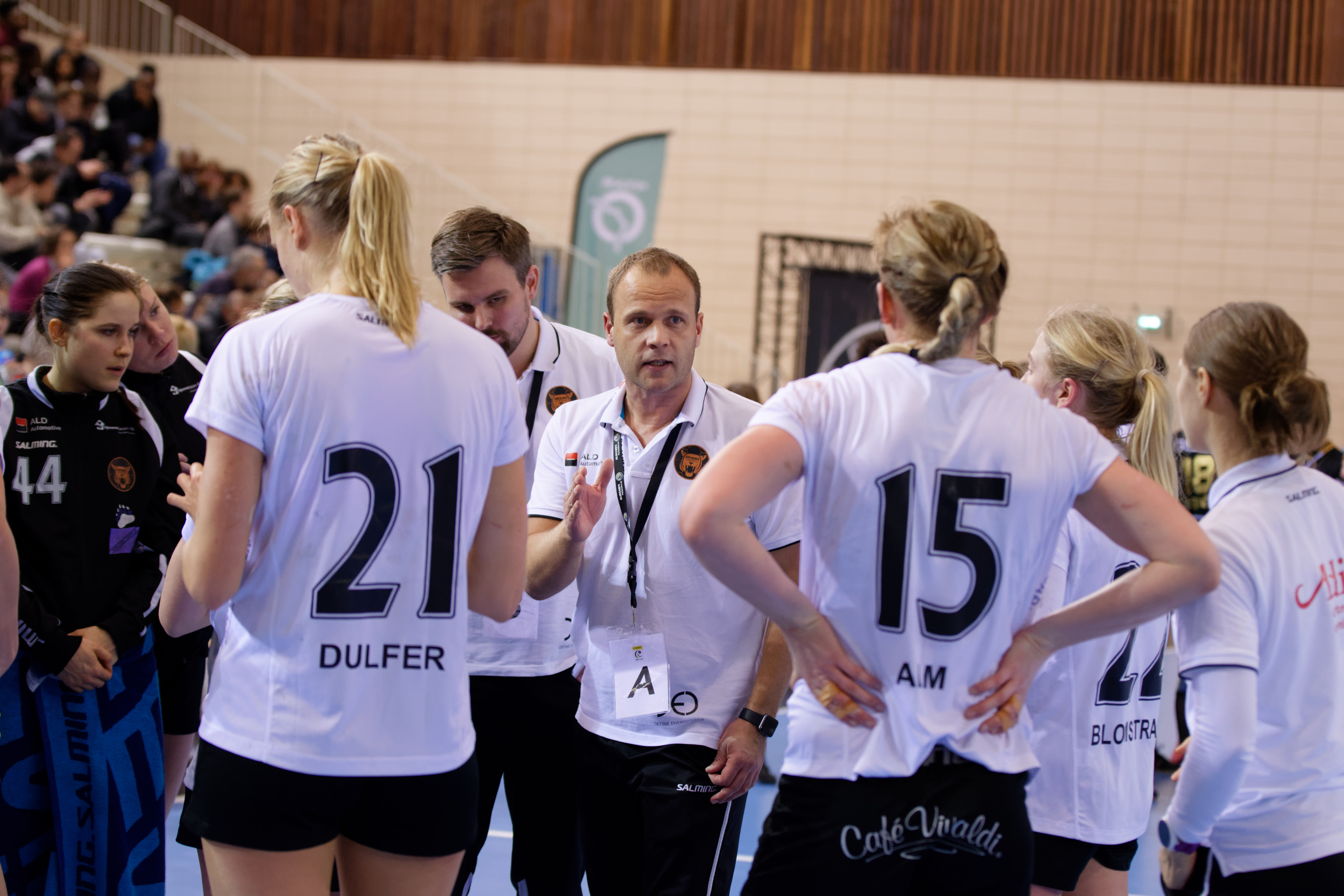 Rencontre du tour principal de la coupe EHF entre Issy Paris Hand et les danoises de Copenhague. A Issy Les Moulineaux, le 28 janvier 2018.